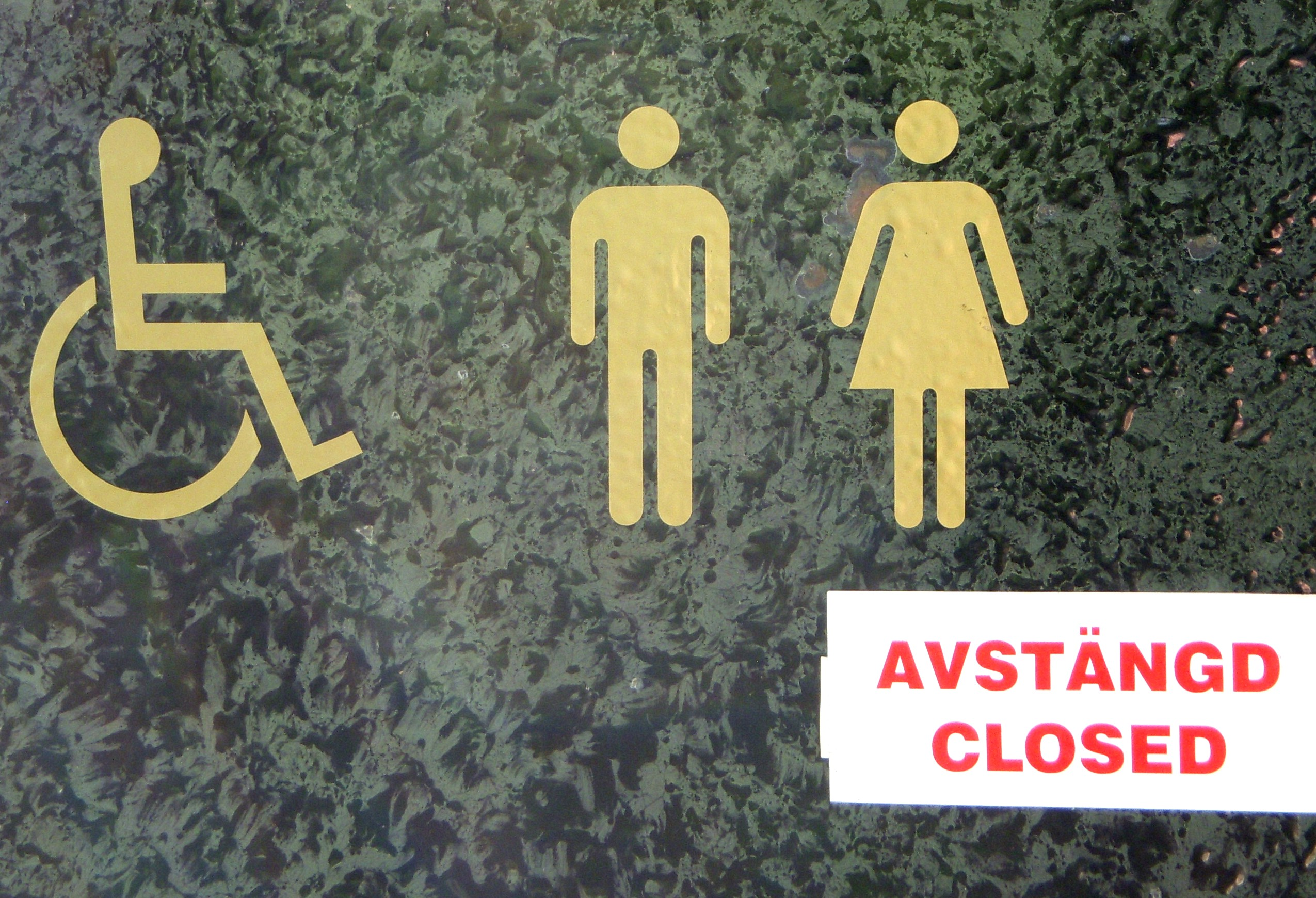 Stängd toalett i Stockholm (Vasaparken)